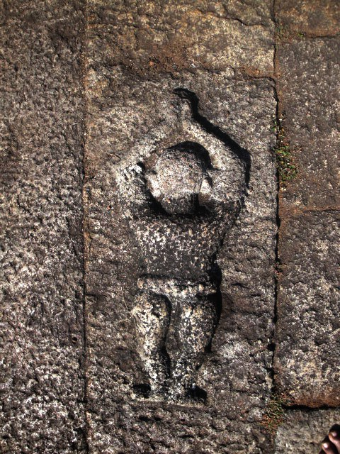 ചെമ്പകശ്ശേരി രാജാവിന്റെ ശില്പം- തിരുവാഴപ്പള്ളി തേവർക്കു മുൻപിലായി സഷ്ടാംഗം നംസ്കരിക്കുന്നു.